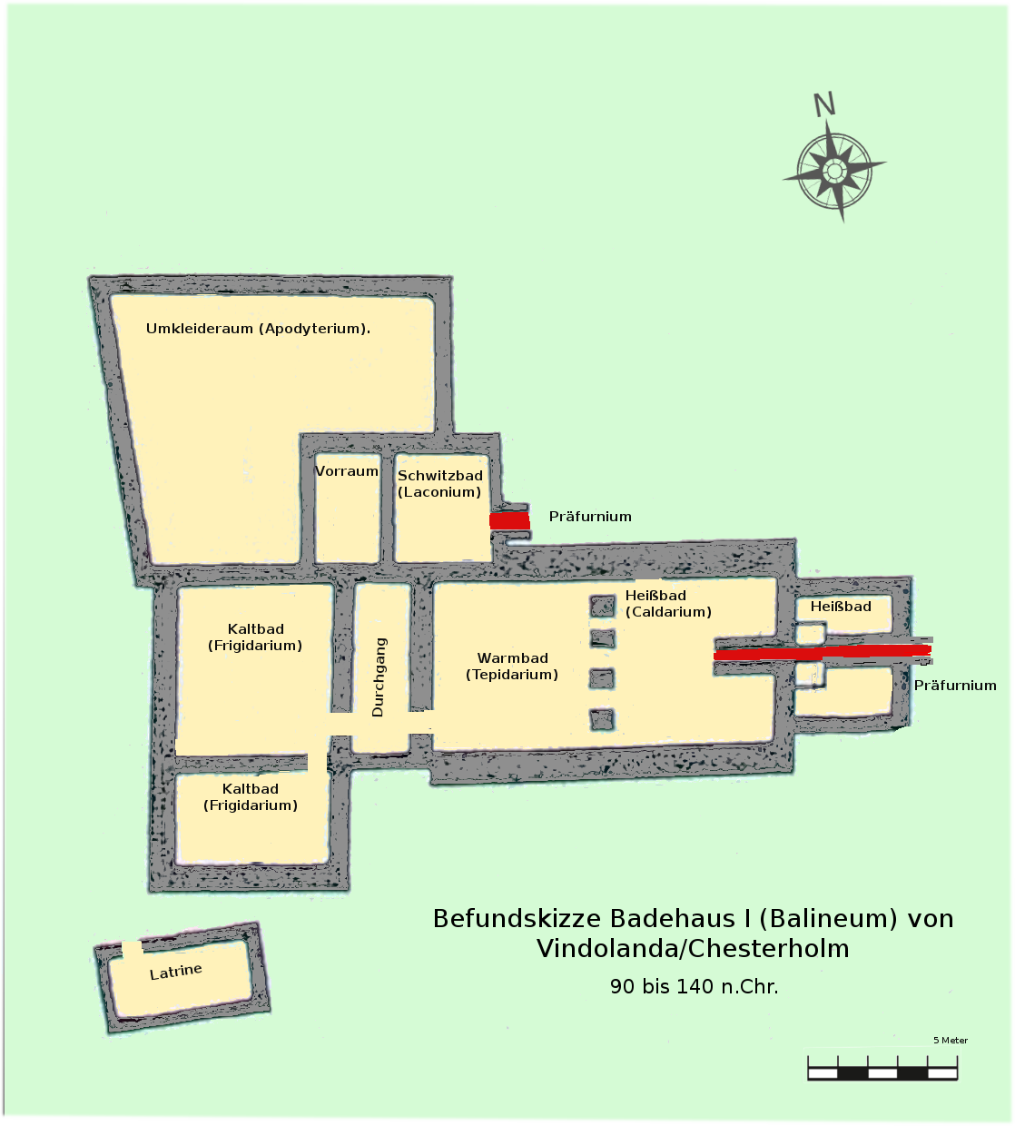 Befundskizze des Badehaus I, Vindolanda/Chesterholm (90-140 n.Chr.)